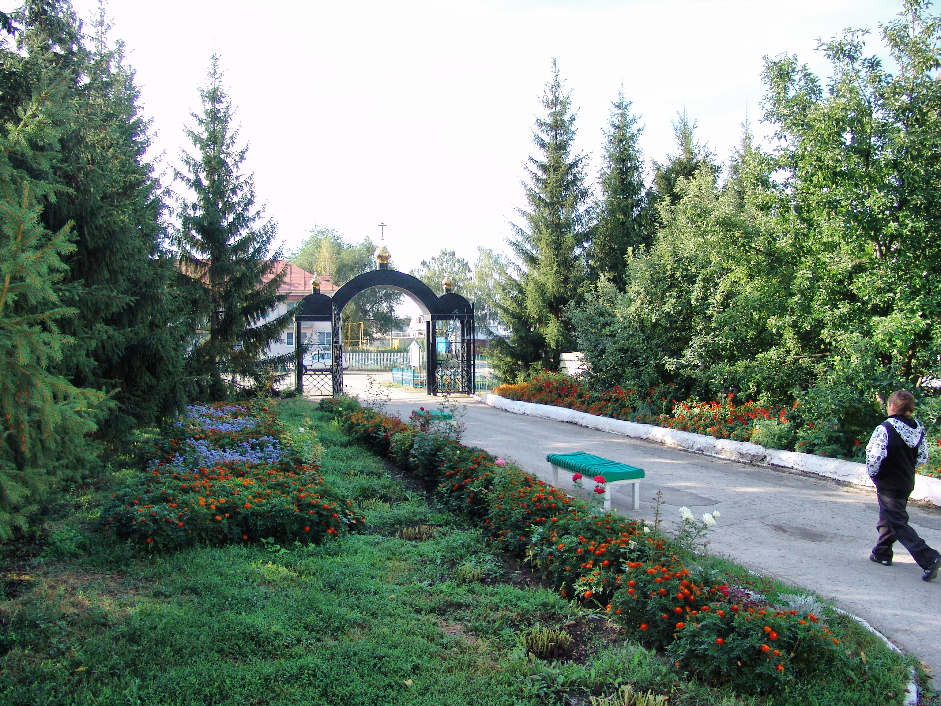 Шигоны, на территории храма Святого Архангела Михаила